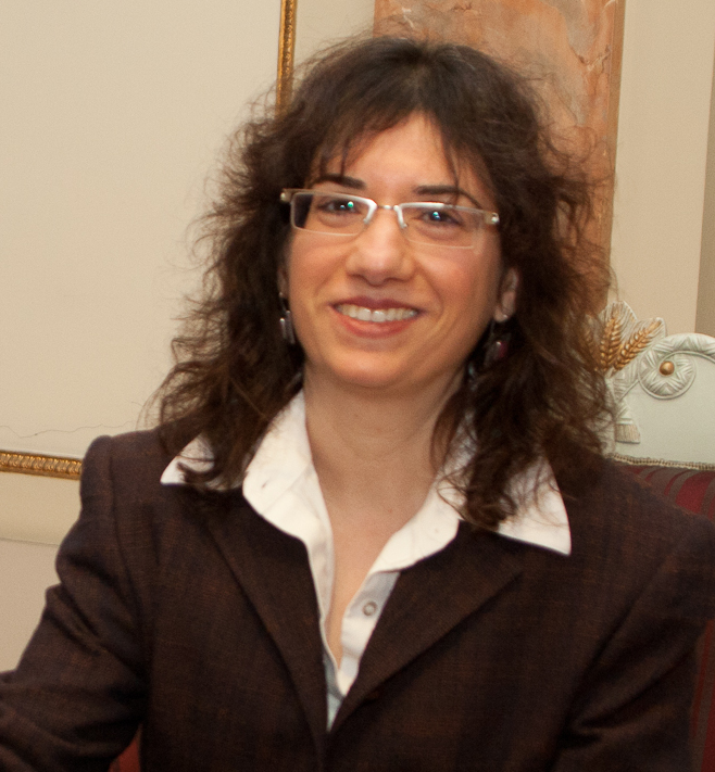 Foto: Toms Norde, Valsts kanceleja